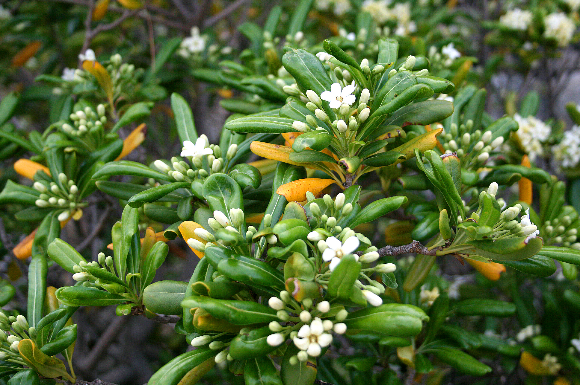 Feuilles et fleurs du Pittospore du Japon (Pittosporum tobira). Walon: Fouyes èt fleûrs do Pitospore do Japon (Pittosporus tobira).